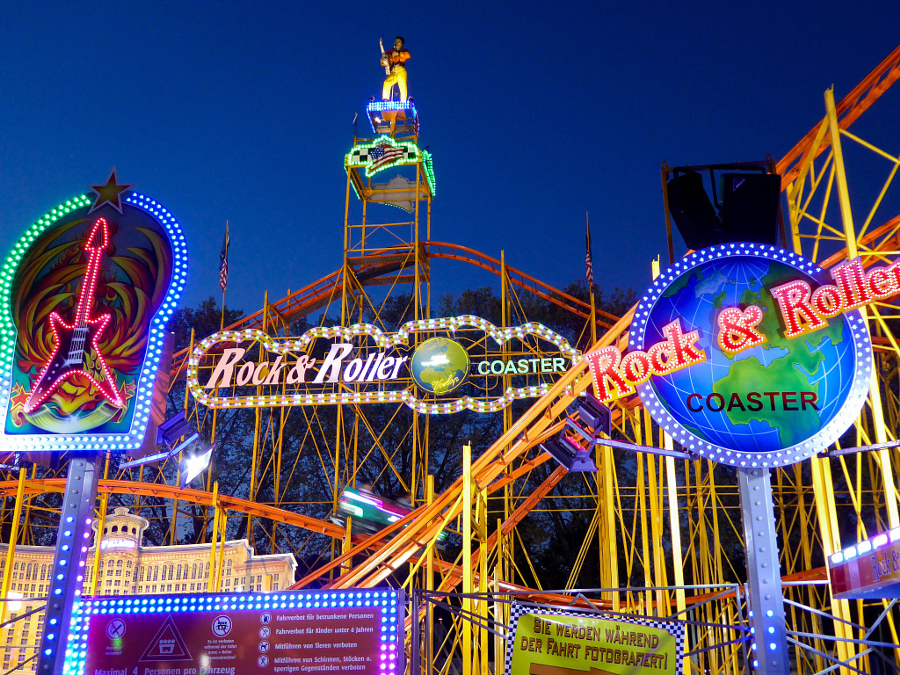 Американские горки в городе Мангейм, Германия